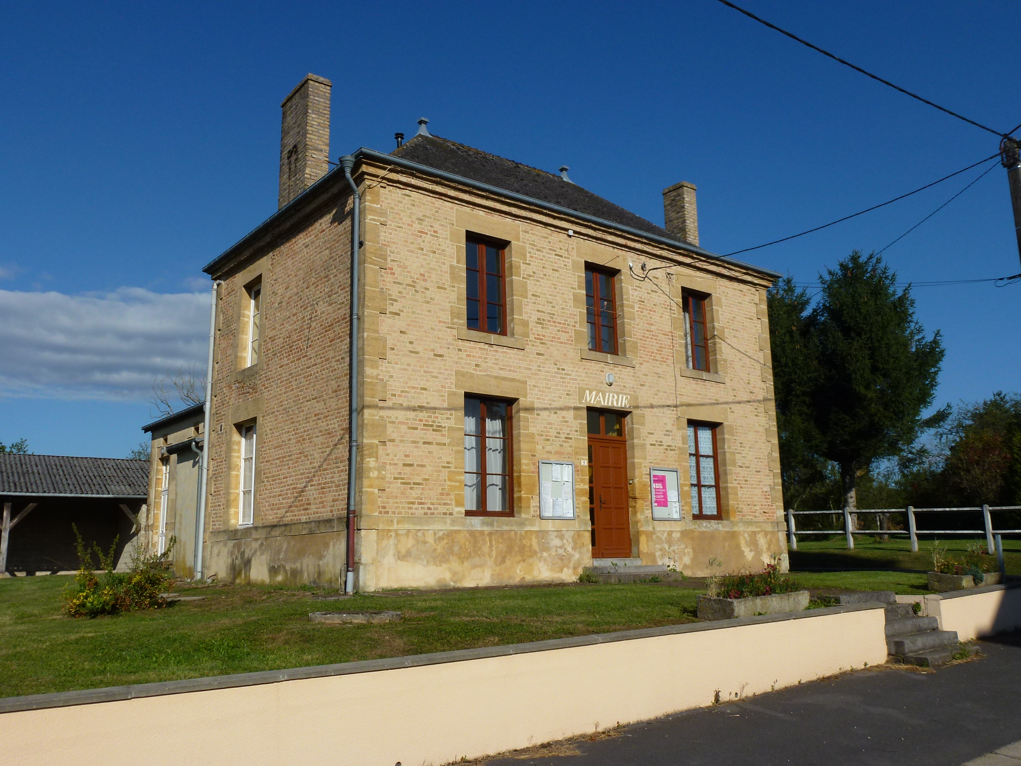 La Sabotterie (Ardennes) mairie